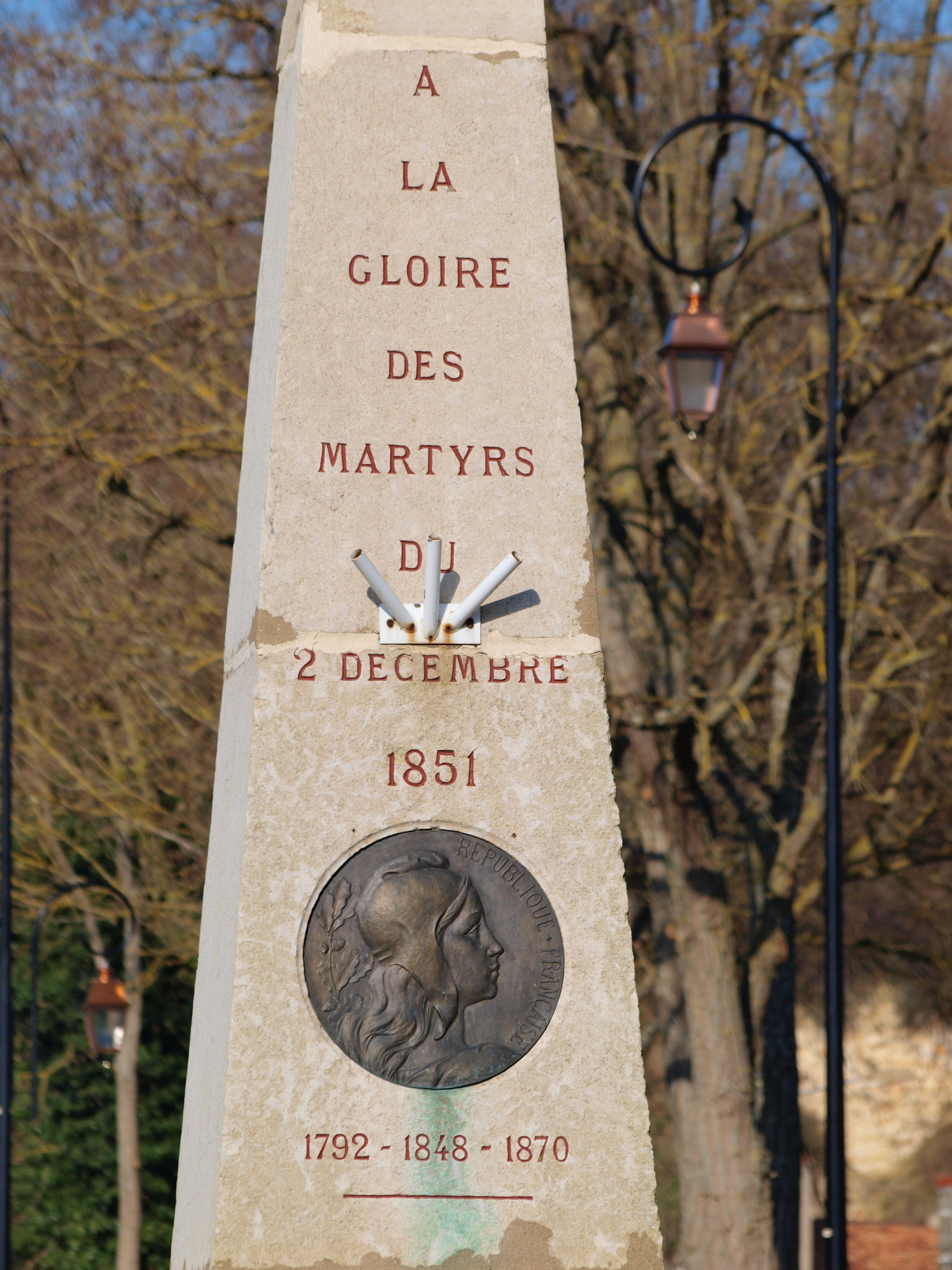 Neuvy-sur-Loire (Nièvre, France) ; mémorial aux victimes du bonapartisme, de sinistre mémoire.